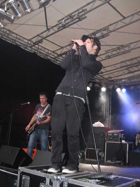 Bild der Band Emil Bulls bei einem Live-Auftritt in Gießen, selbst fotografiert